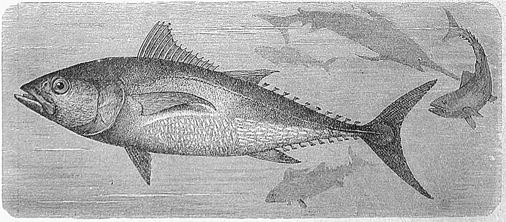 Thunnus thynnus